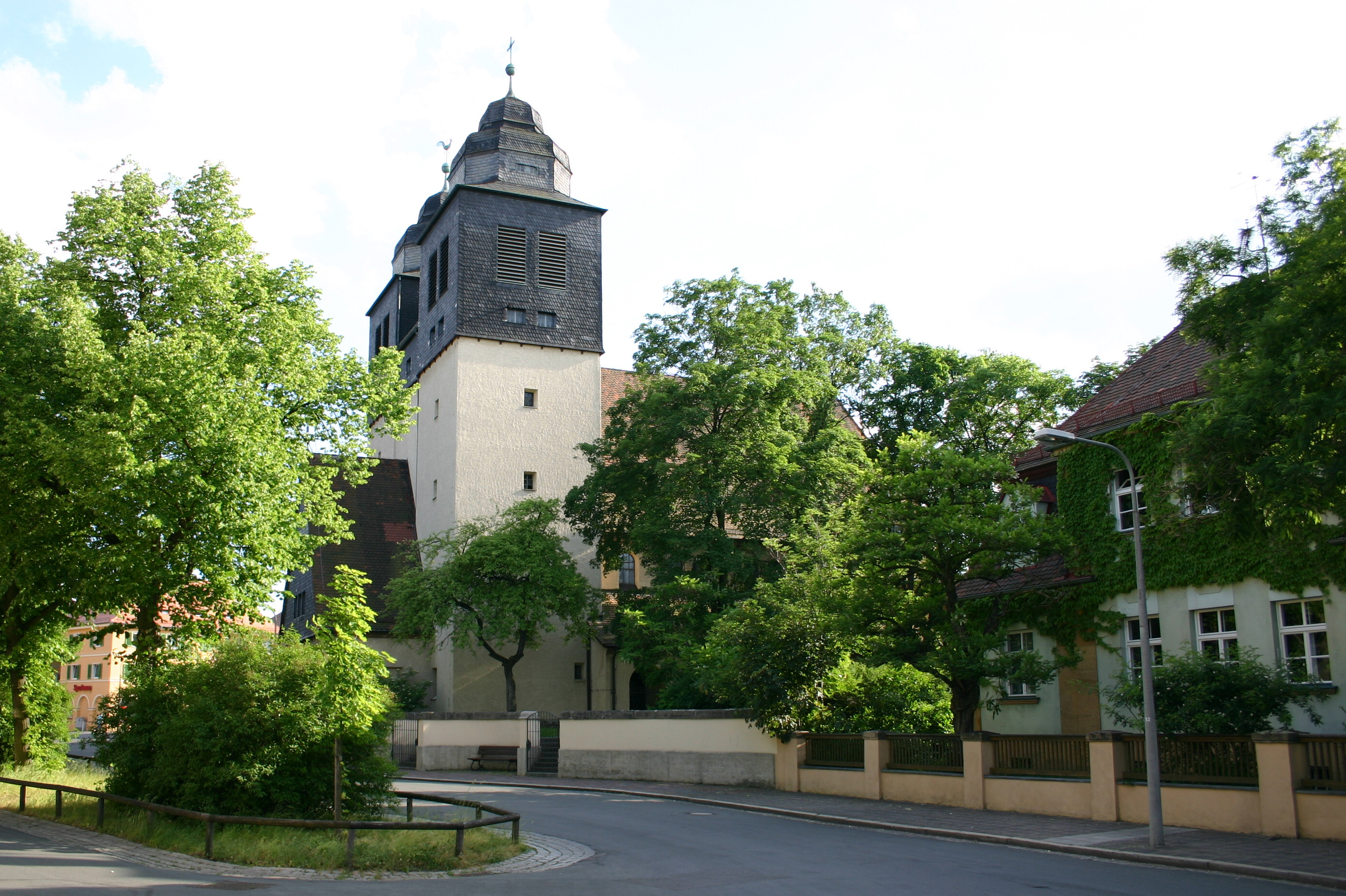 Kirche St. Paul, Bauernfeindstr. 21